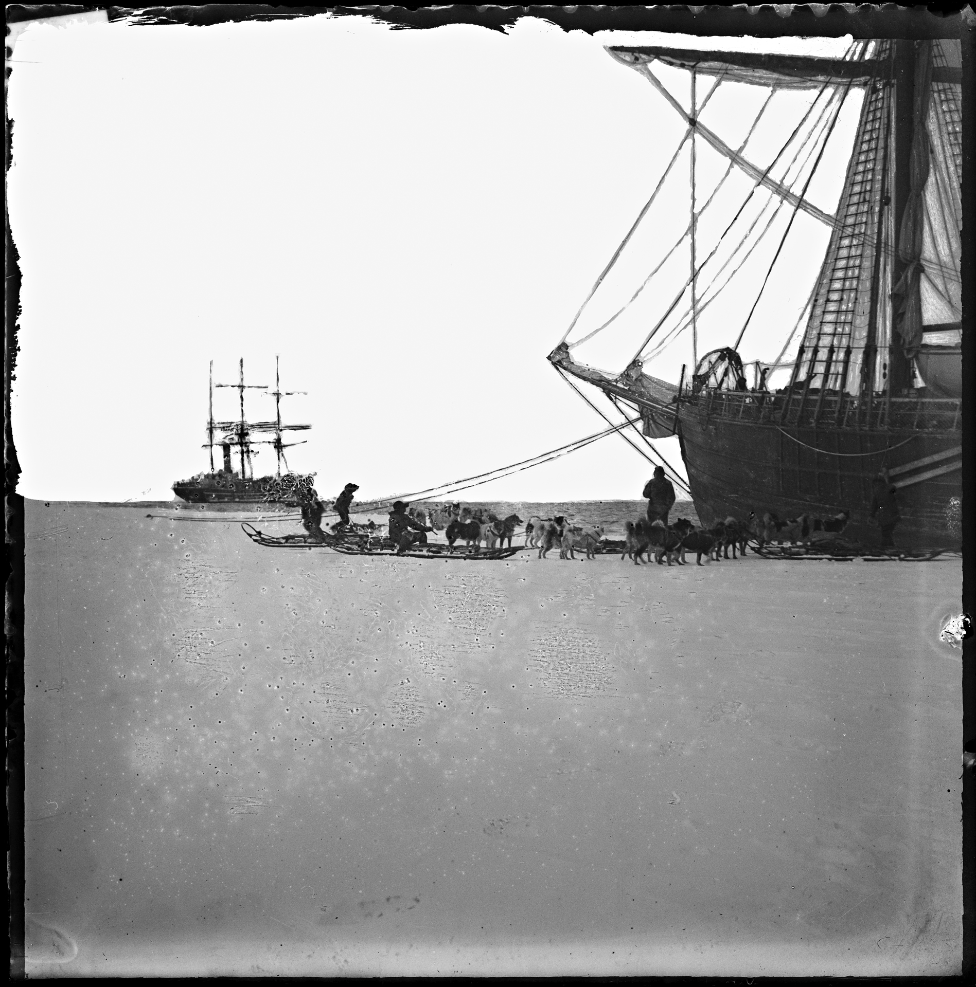 Tittel / Title: "Fram" og "Terra Nova" i Hvalbukta Motiv / Motif: "Terra Nova" var Scotts skip. Scott og hans menn gikk til Sydpolen fra et utgangspunkt som lå lengre vest. Dato / Date: 4. februar 1911 Fotograf / Photographer: ukjent / unknown Sted / Place: Antarktis, Hvalbukta Eier / Owner Institution: Nasjonalbiblioteket / National Library of Norway Lenke / Link: Bildesignatur / Image Number: bldsa_NPRA1472